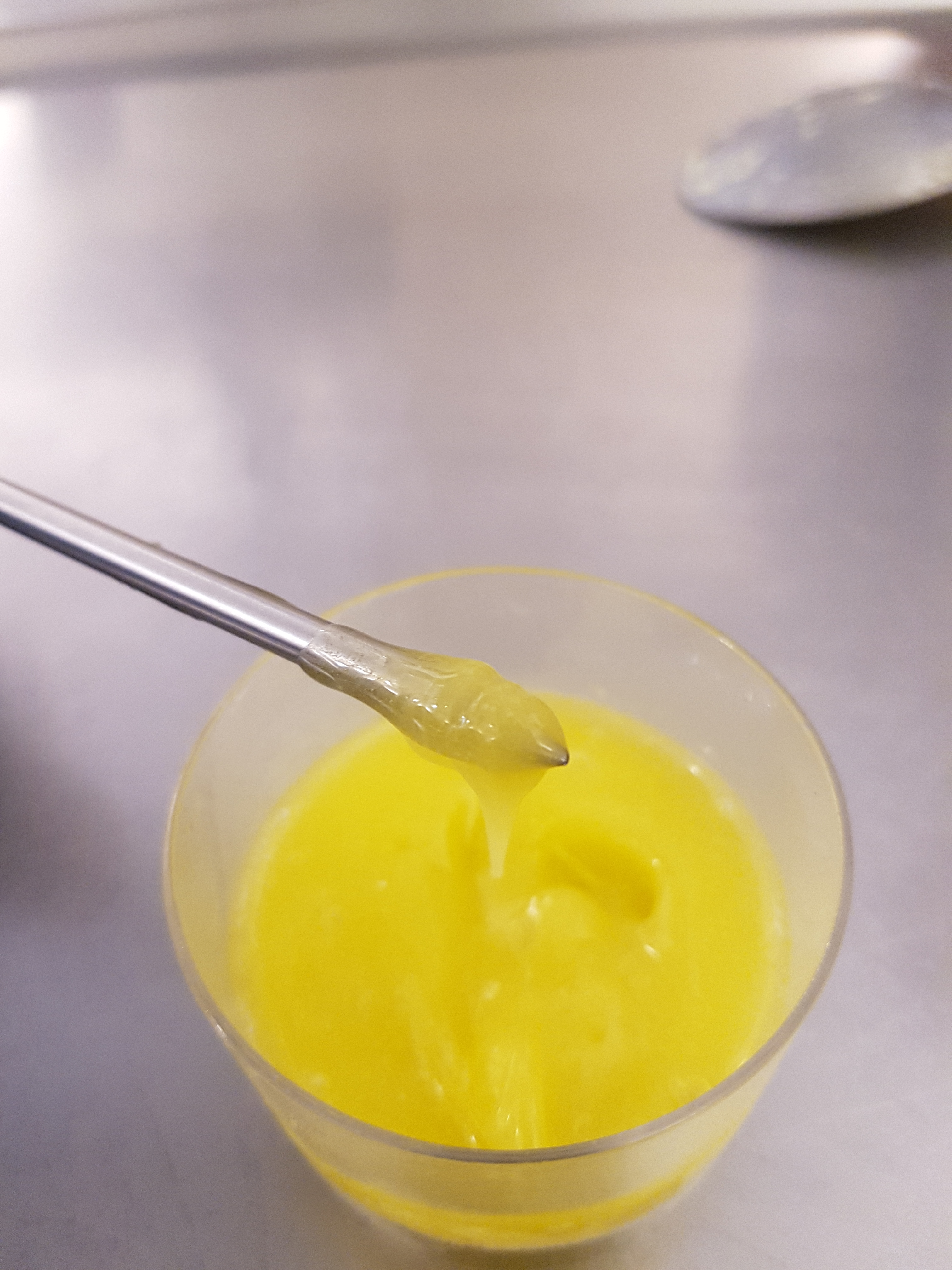 oli oliva texturitzat pel fred